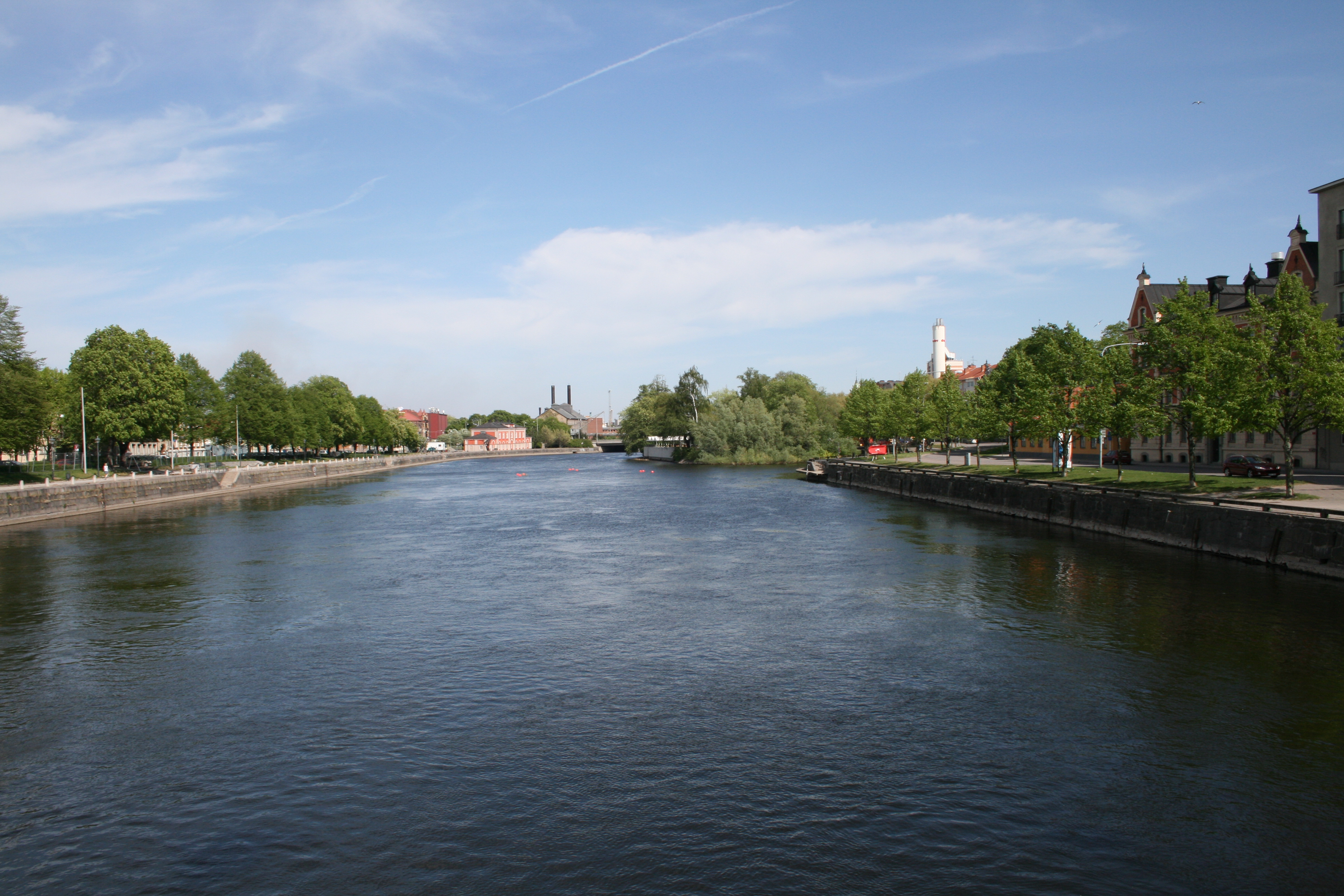 Utsikt över Motala ström från Saltängsbron i Norrköping